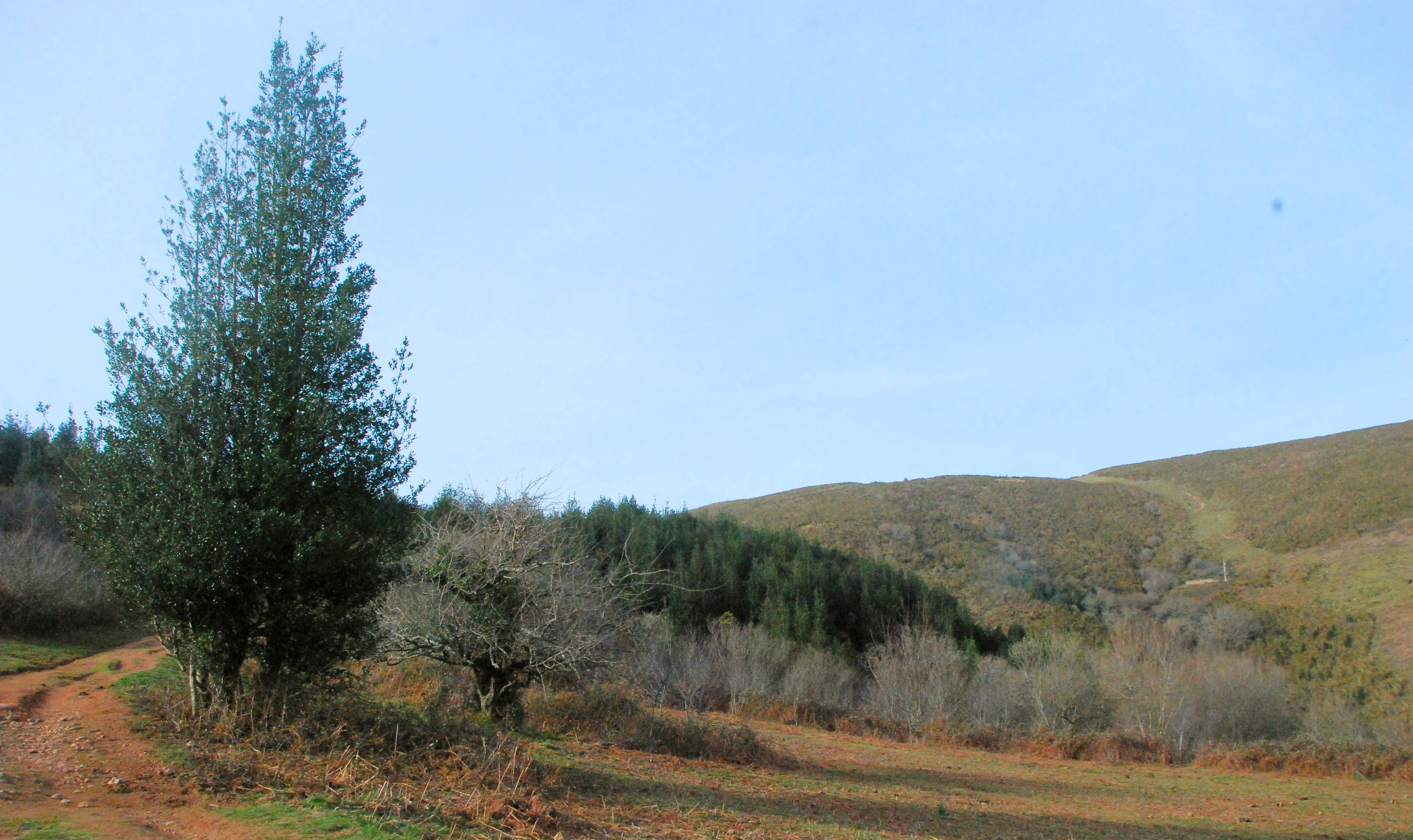 Gorostidia Xolko mendian Osingo zelaian